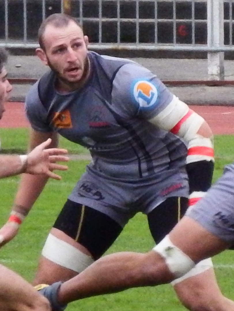 Pro D2 2013-2014 — 24 November 2013, Stade Maurice-Boyau. Match between: US Dax — Tarbes Pyrénées rugby